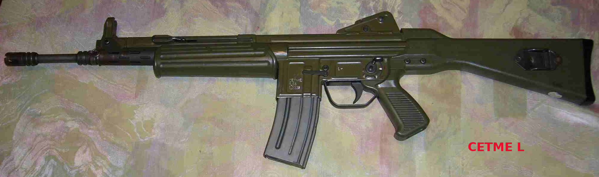 Espanol = Vista completa del lateral izquierdo del fusil de asalto CETME Modelo L de calibre 5,56 x 45 (.223) (el número de serie ha sido borrado de la fotografía usando un editor de imagen) English = Full view of the left side of the CETME Model L assault rifle, in 5.56 x 45 (.223) caliber (the serial number has been deleted from the photograph using an image editor)